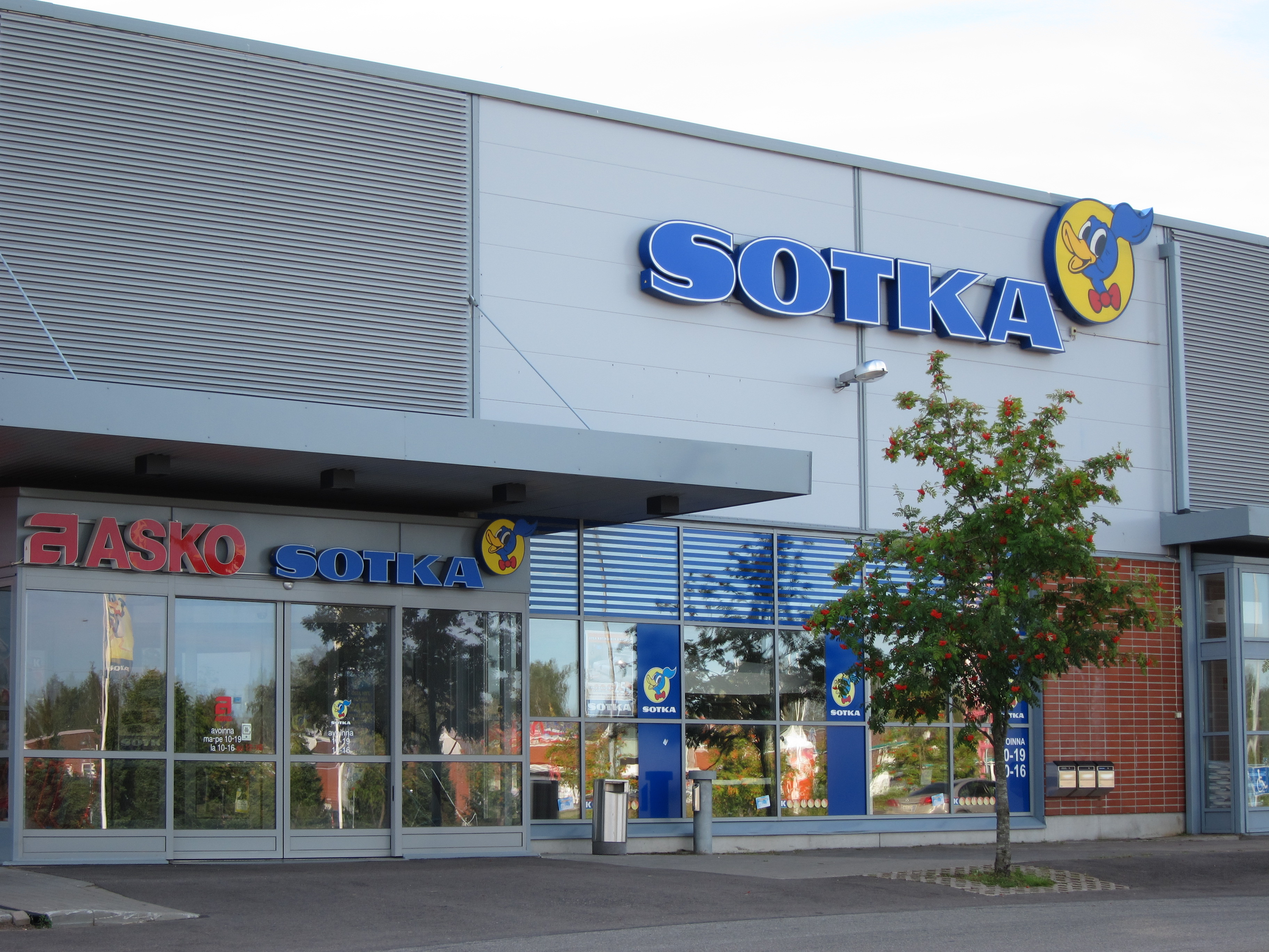 Sotka-huonekalukauppaketjun myymälä Kotkan Jumalniemen kauppakeskuksessa.